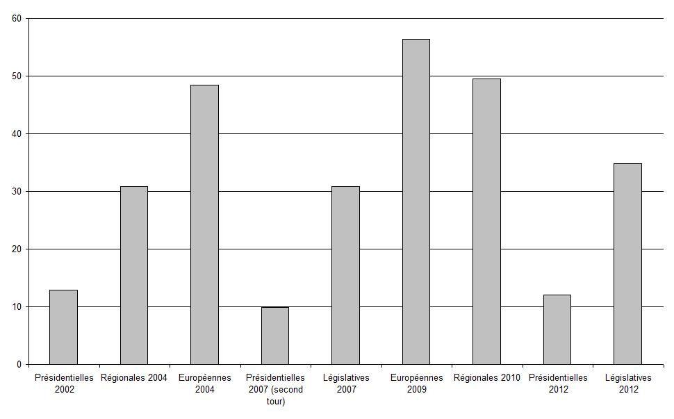 Taux d'abstention aux élections, à Guengat (Finistère, France), entre 20002 et 2012.